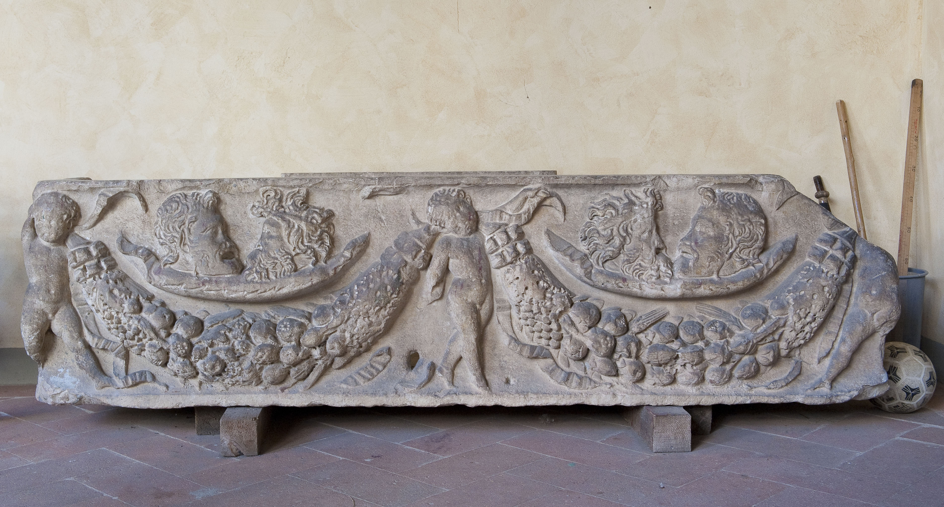 Sarcofago di epoca romana (II secolo d.C.) conservato nel chiostro della pieve di San Giuliano a Settimo - Scandicci